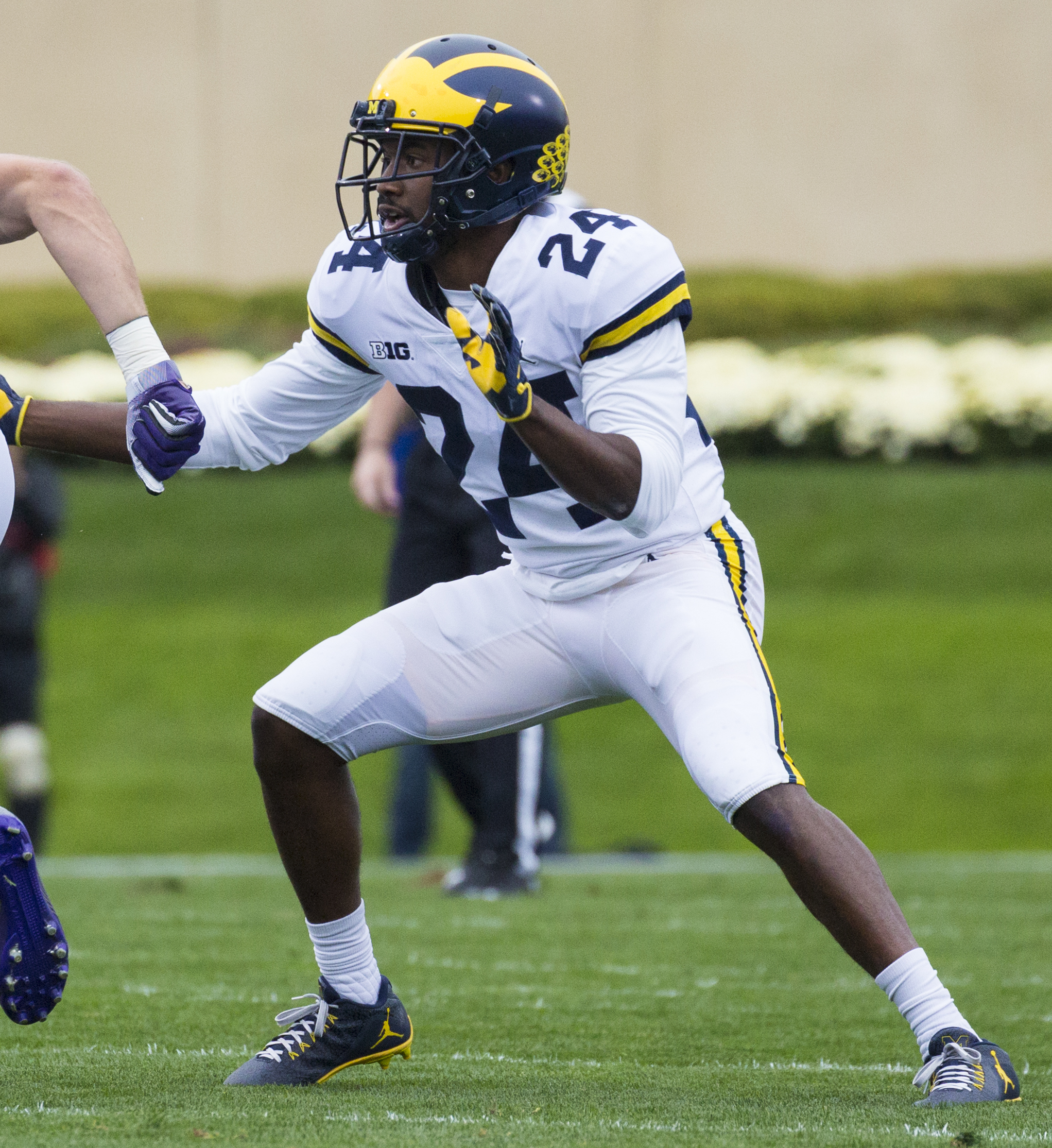 IX8A4654